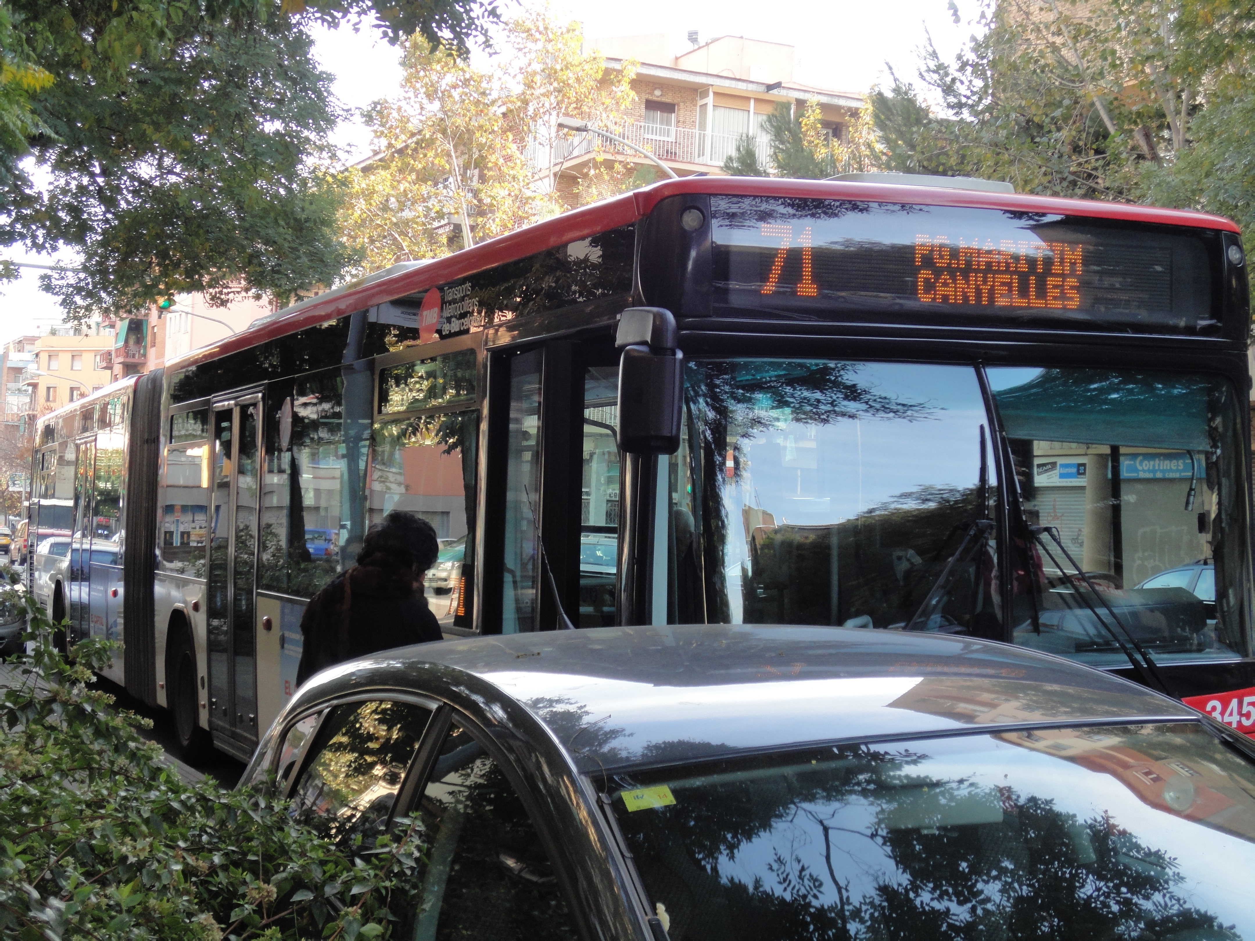 Autobús de la línia 71 a Felip II.